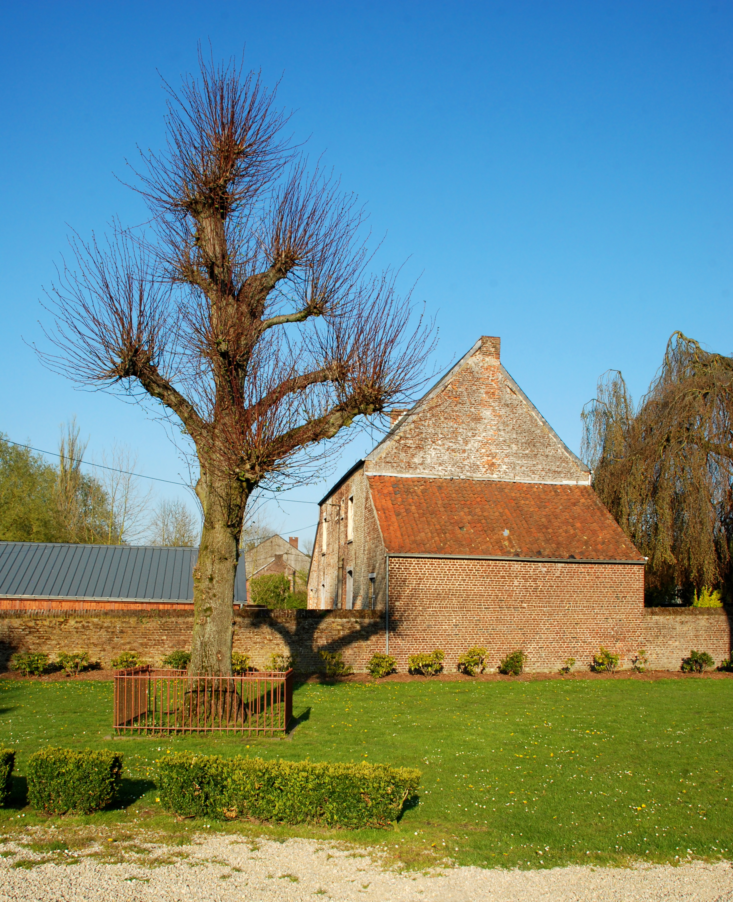 Belgique - Brabant wallon - Ways - Presbytère situé à côté de l'église Saint-Martin